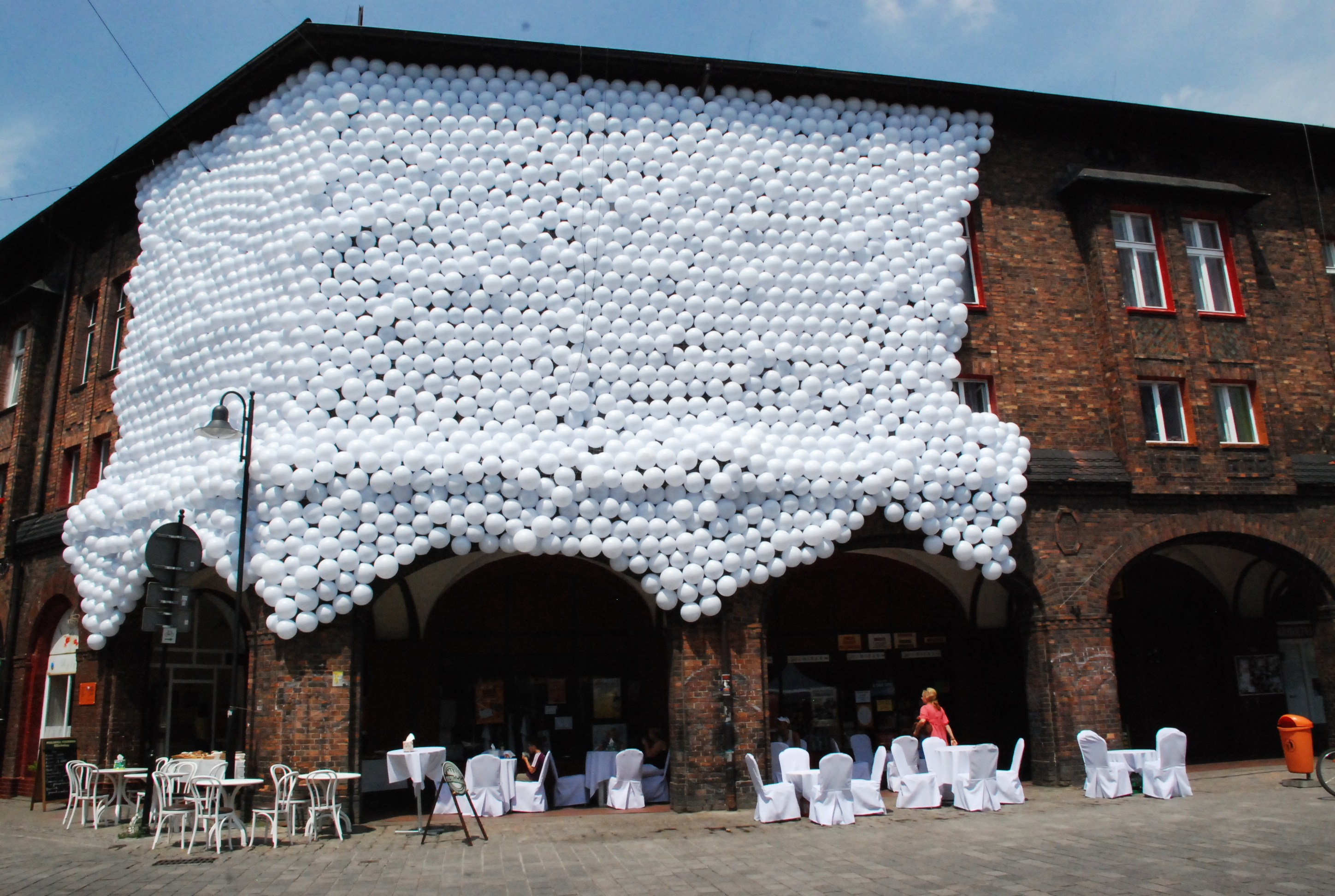 Industriada w Katowicach-Nikiszowcu